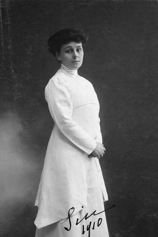 Воронцова-Дашкова Варвара Давыдовна (1870—1915), урожденная Орлова, с 1890 г. жена графа Ивана Илларионовича Воронцова-Дашкова. Фотоателье Е. Клара.